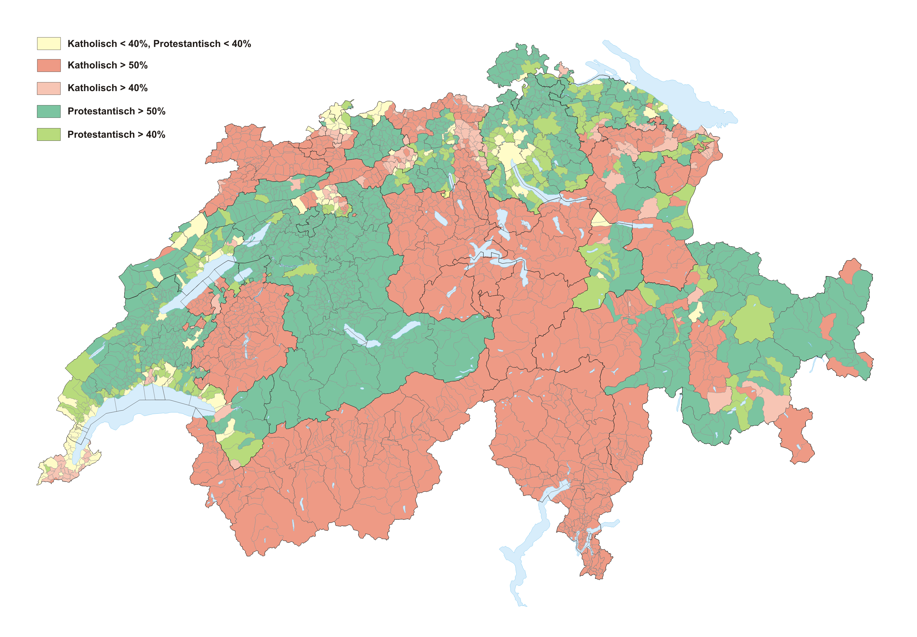 Religion in Switzerland 2008 / Schweizer Konfessionsgebiete 2008